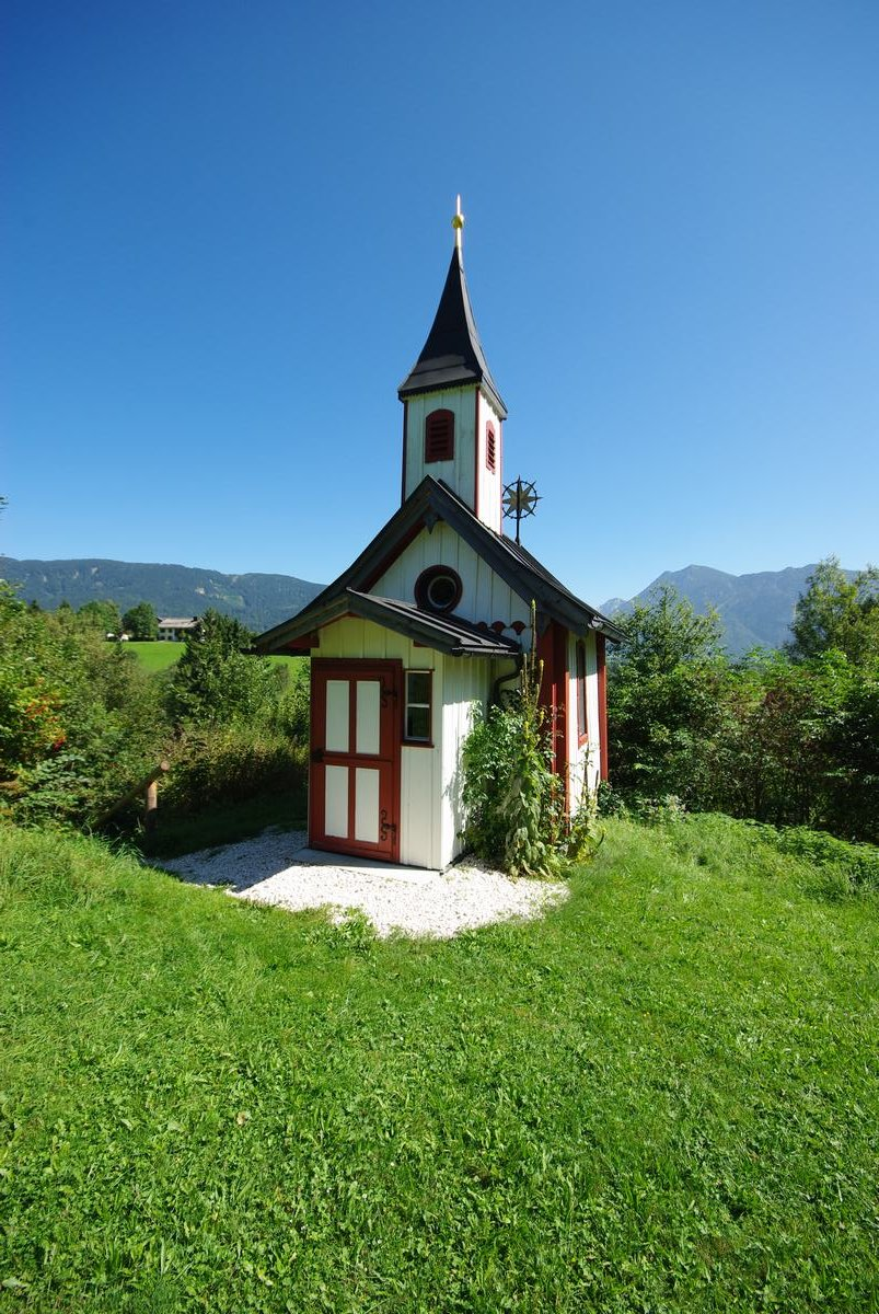 Wien, 83334 Inzell; AntoniuskapelleThis is a photograph of an architectural monument.